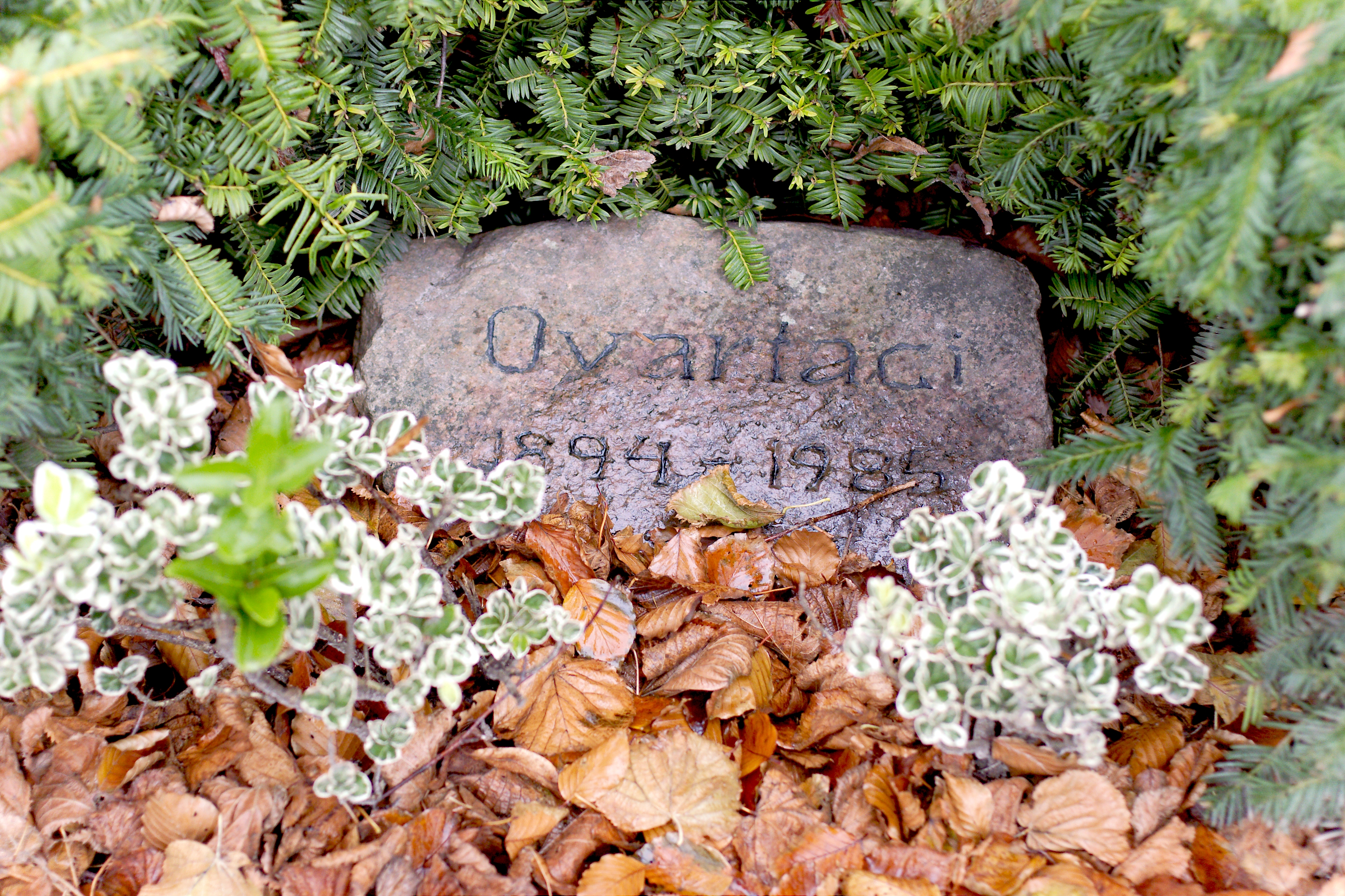 Ovartacis gravsted på kirkegården ved Risskov Kirke